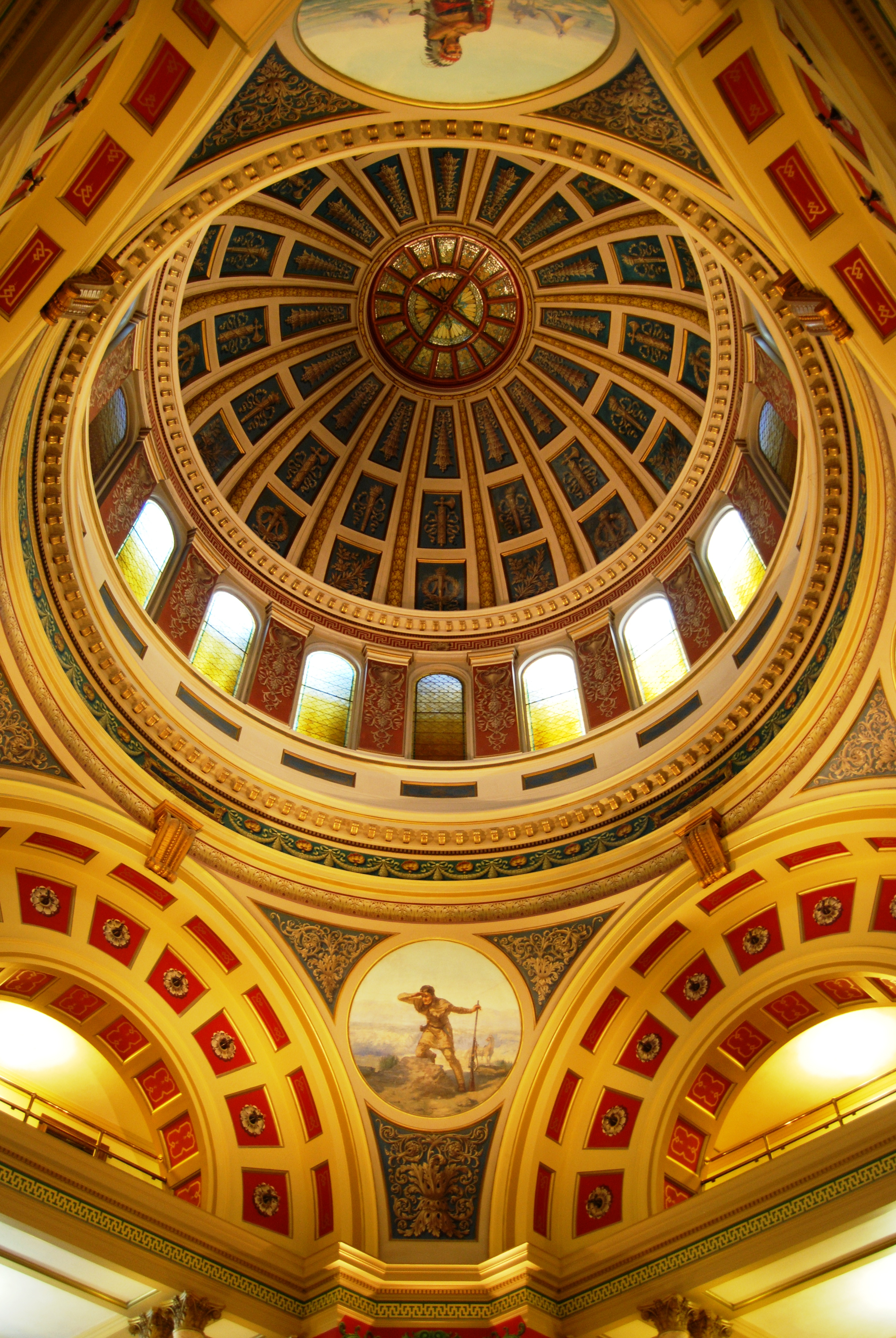 Montana State Capitol dome, Helena